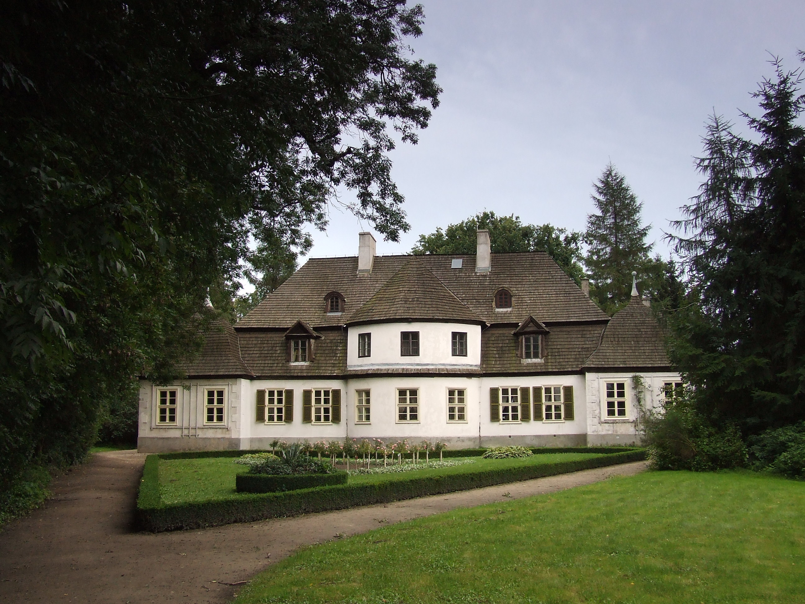 Dwór w Koszutach, obecnie Muzeum Ziemi Średzkiej.